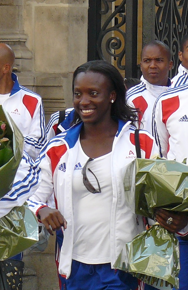 Véronique Mang, athlète française (sprint), lors de la réception à l'Élysée des médaillés de Barcelone , le 3 août 2010.